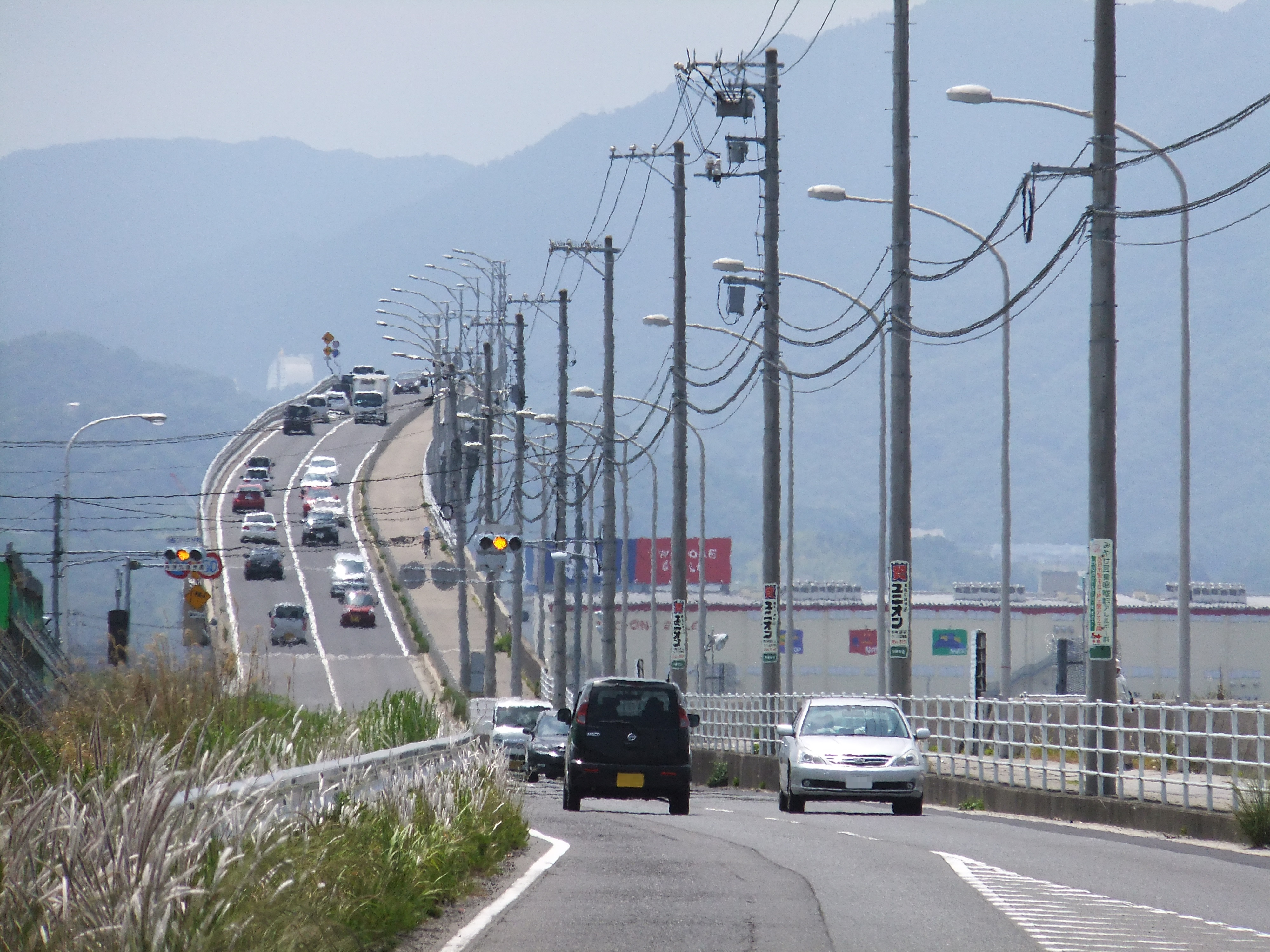 広島はつかいち大橋